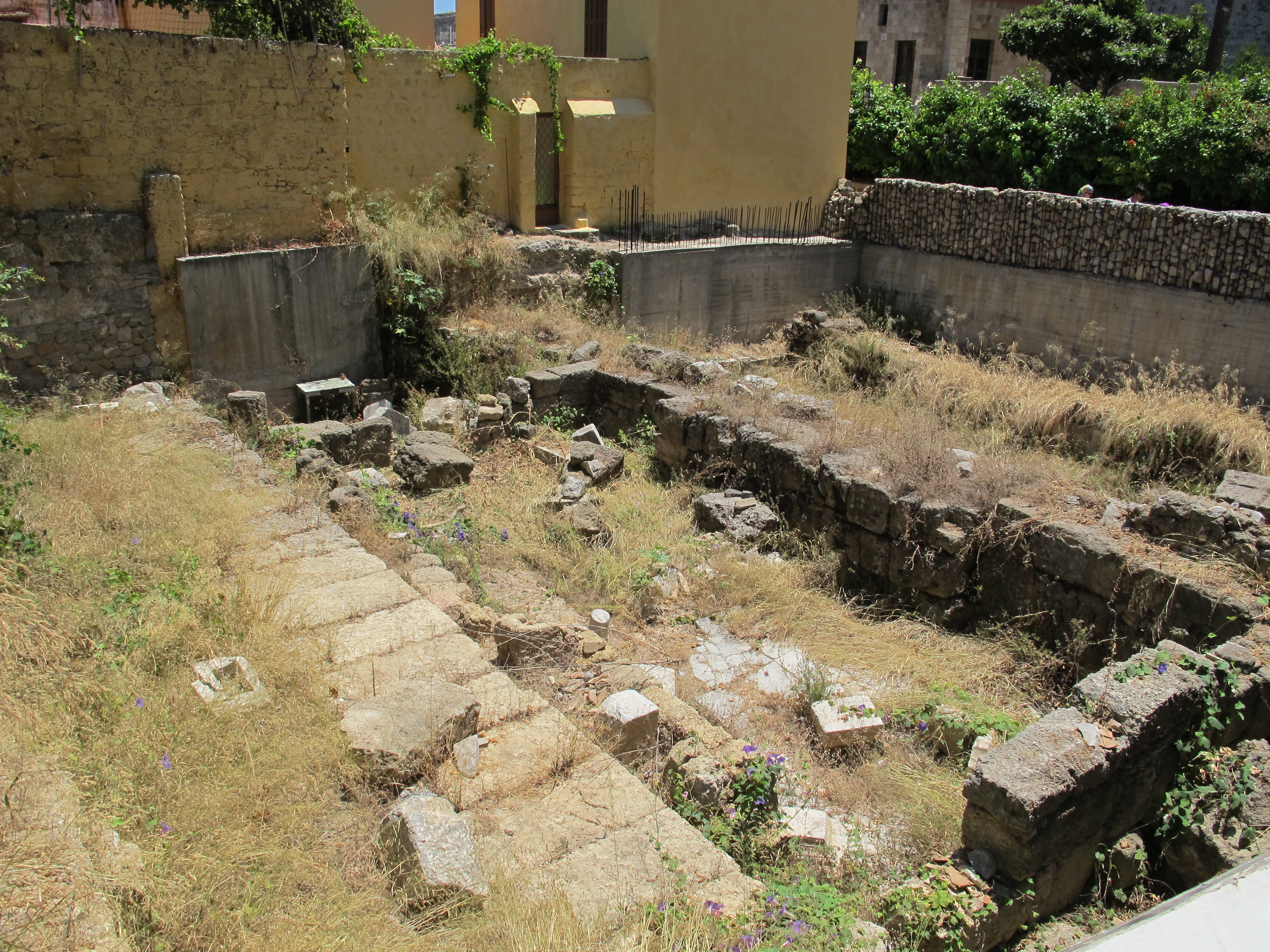 Rodi, agorà romana